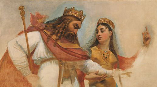 Détail de l’esquisse pour le décor de la coupole de l’église Sainte-Geneviève.